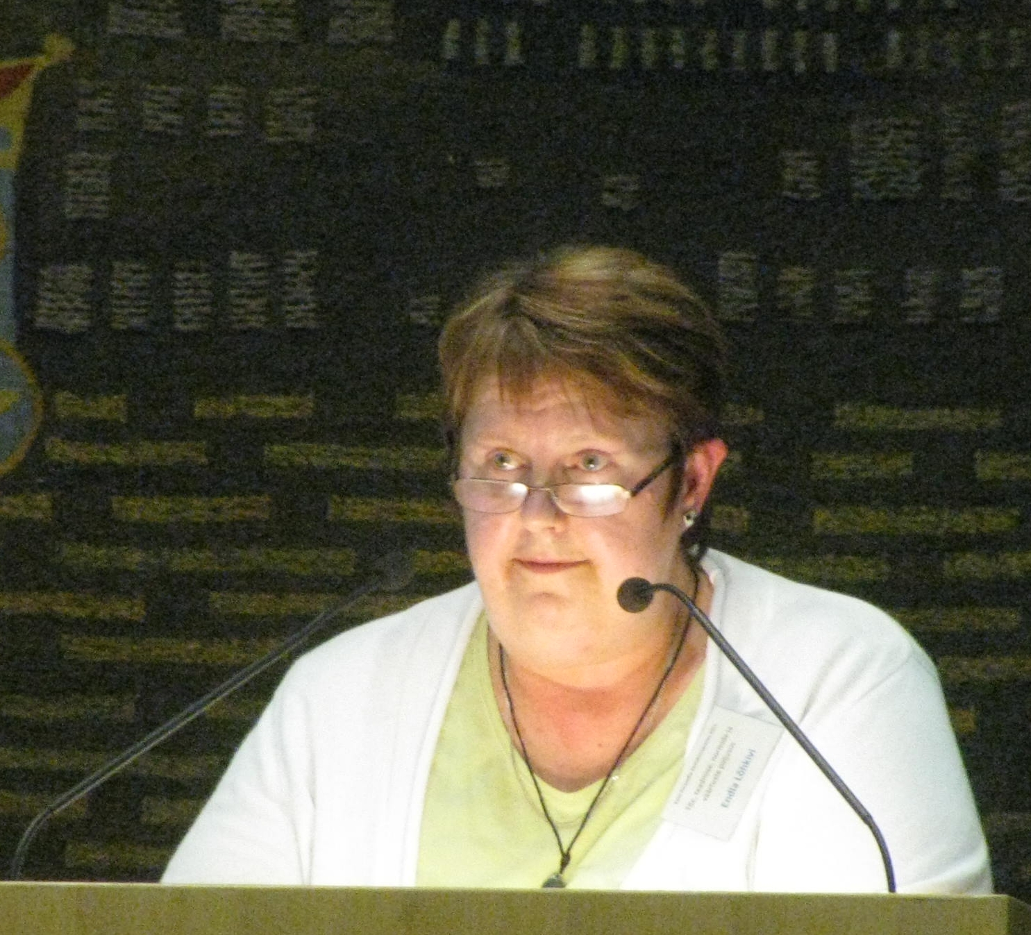 Endla Lõhkivi esinemas Eesti filosoofia 7. aastakonverentsil Tartus